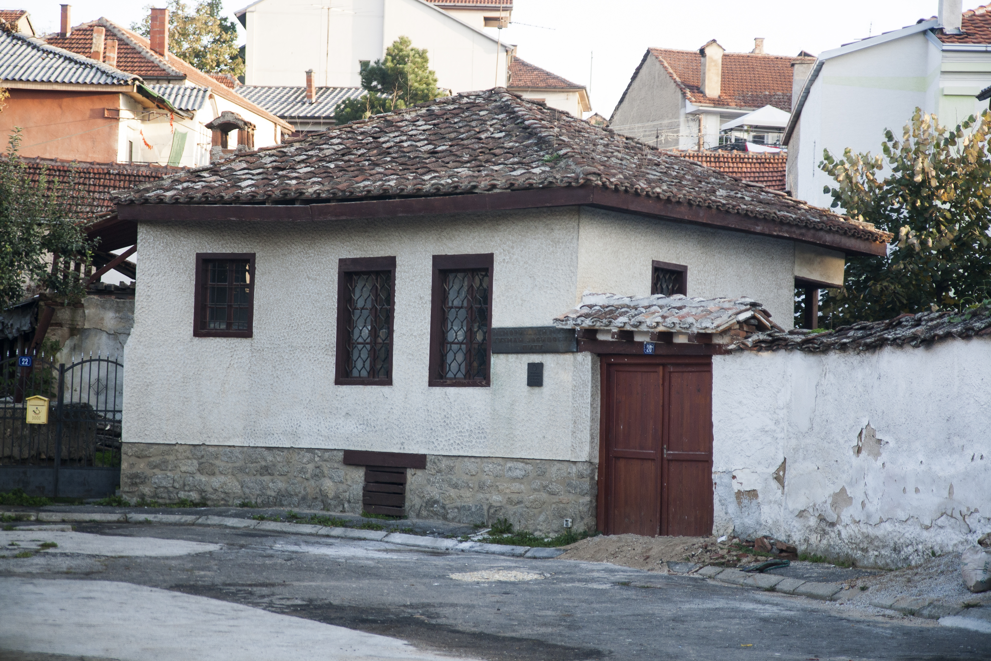 Куќа на Кузман Јосифоски - Питу ул. “Мара Јосифоска“ бр. 20